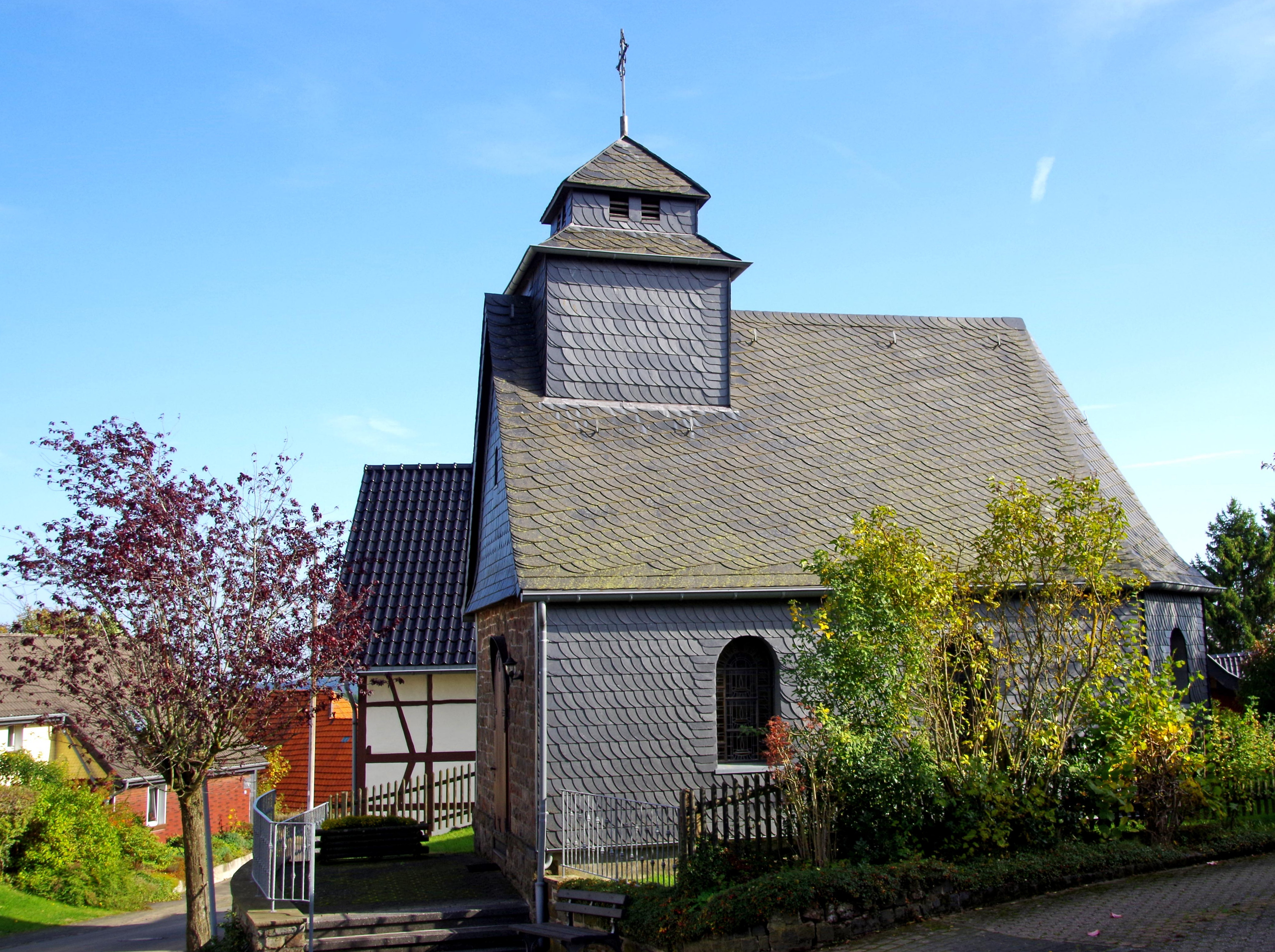 Maria-Hilf-Kapelle (Berescheid), Westansicht